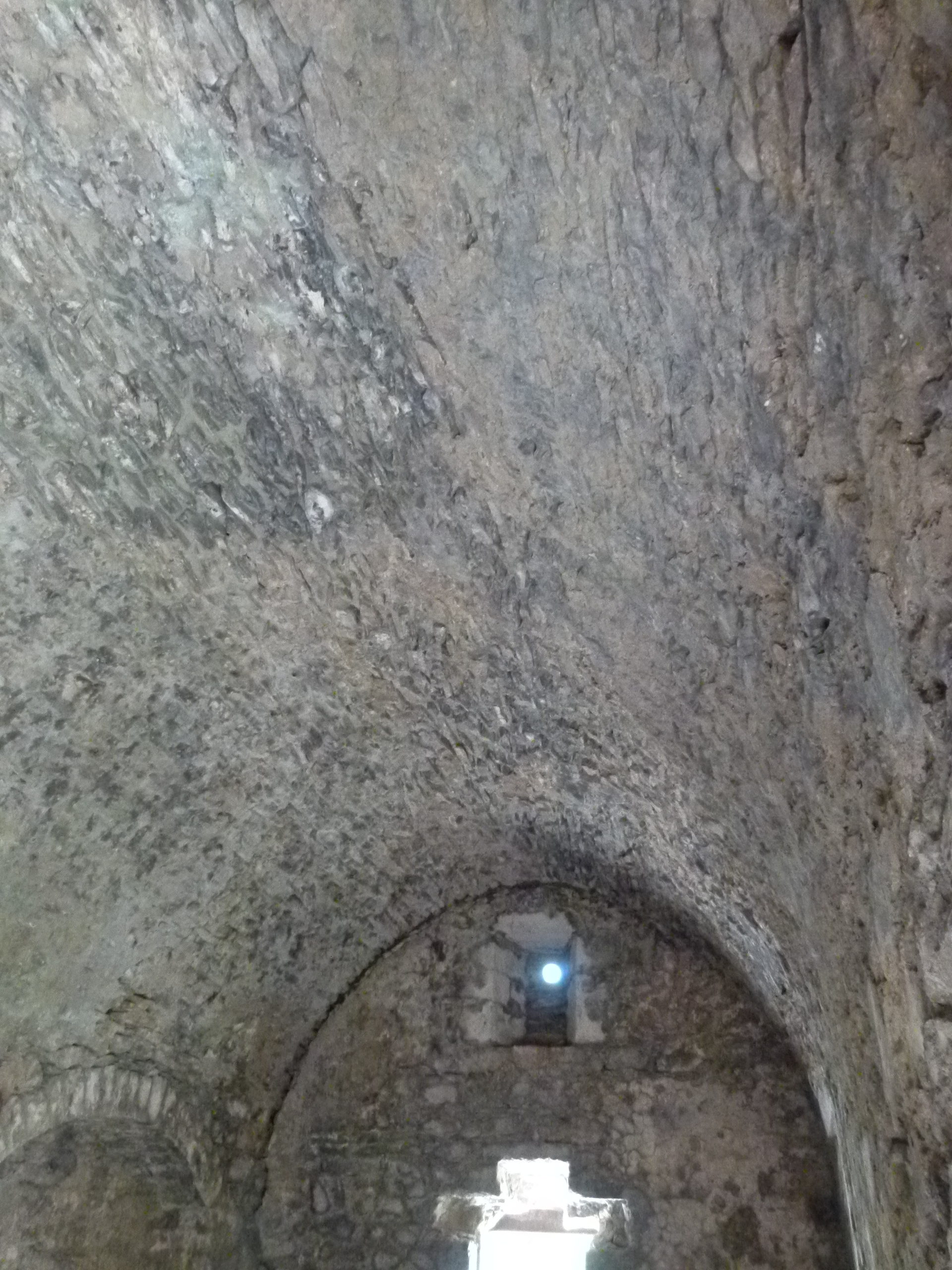 Capella de Santa Margarida i Hospici de Santa Maria de Colldares (Prats de Molló i la Presta) .